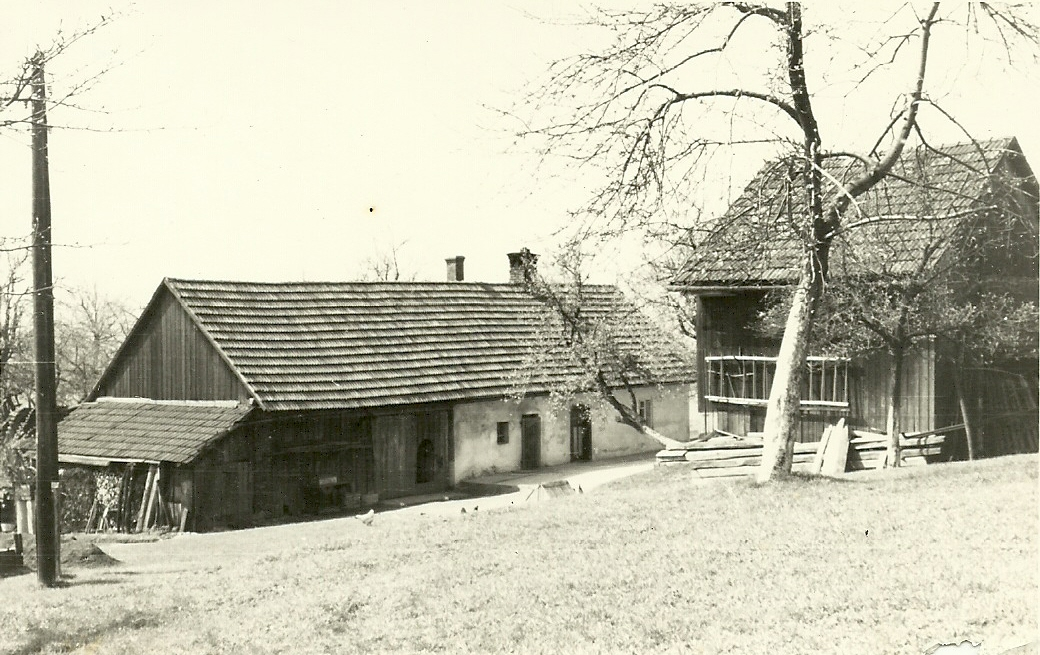 Vělopolí. Chalupnická usedlost č. p. 36; 50. léta 20. století